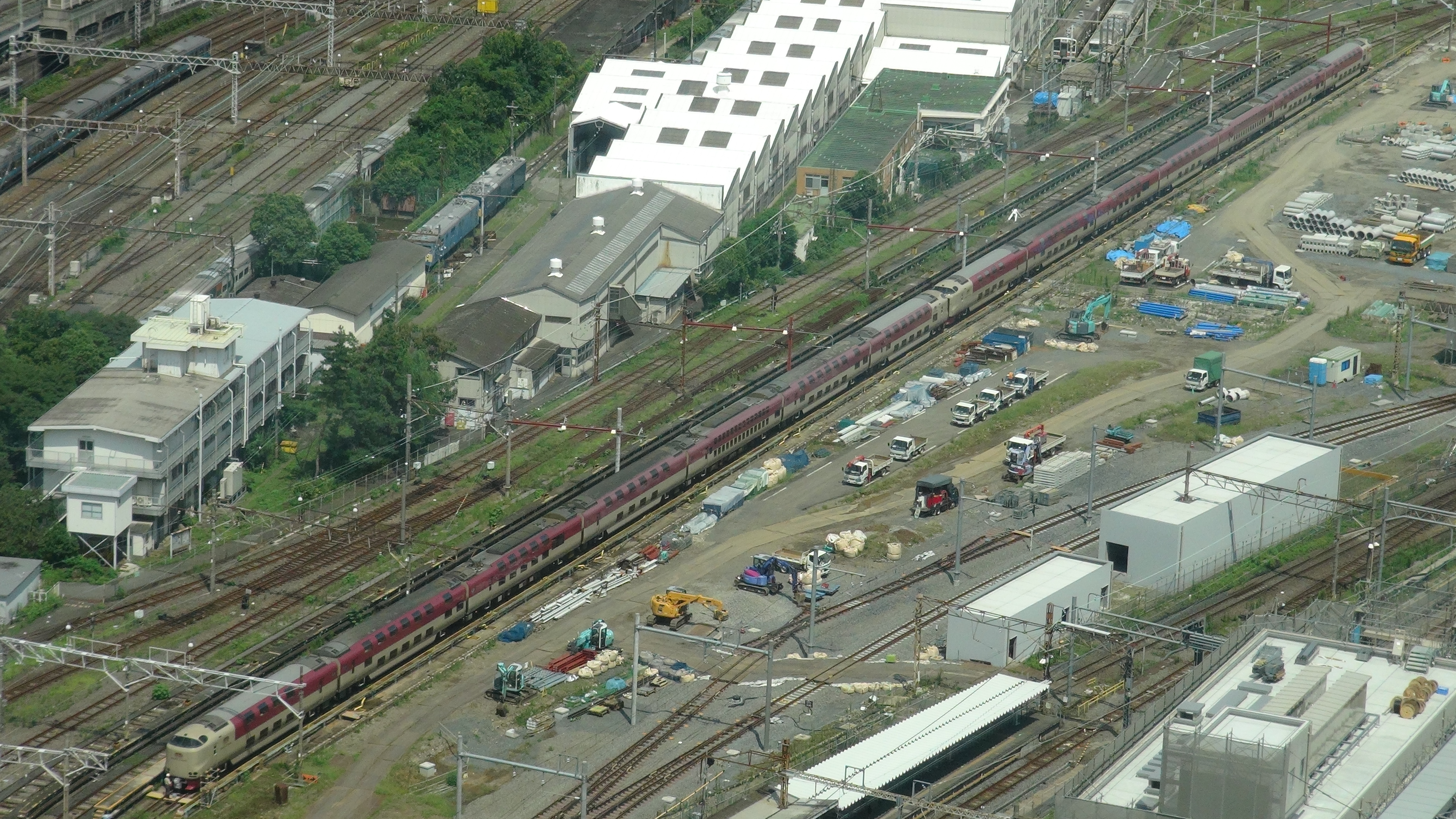 日中、田町車両センターに留置されている285系。